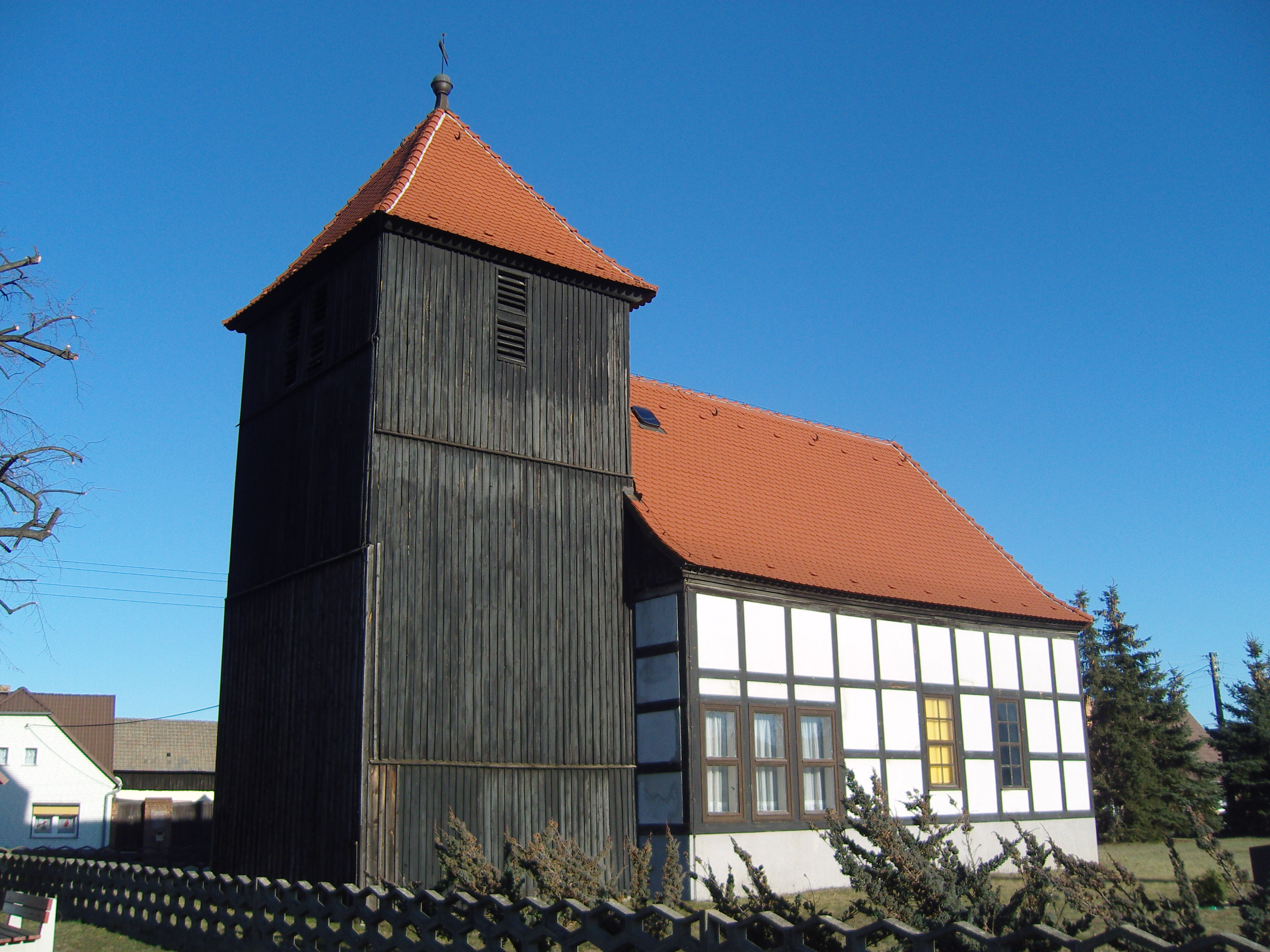 Dorfkirche in Lieske, Niederlausitz; 1750 erbaut